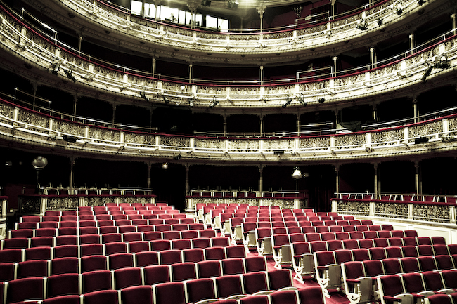 Teatro María Guerrero, Madrid, España.